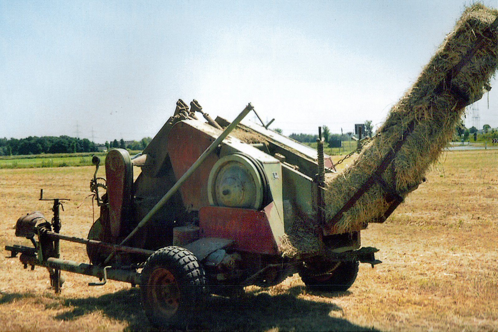 Alte Strohpresse in Sinnersdorf